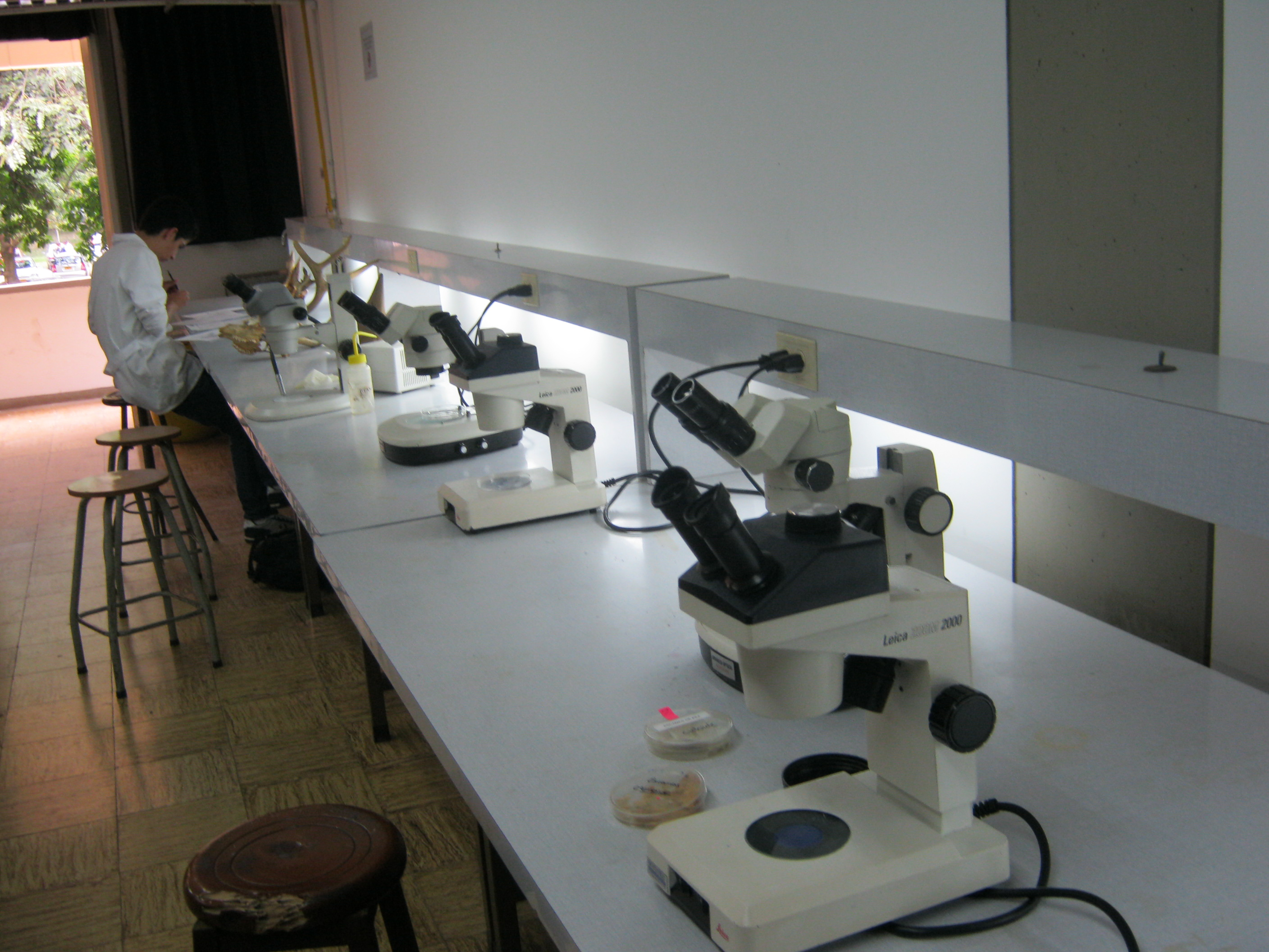 Estetoscopios en el Laboratorio de Zoología de Vertebrados en Univalle